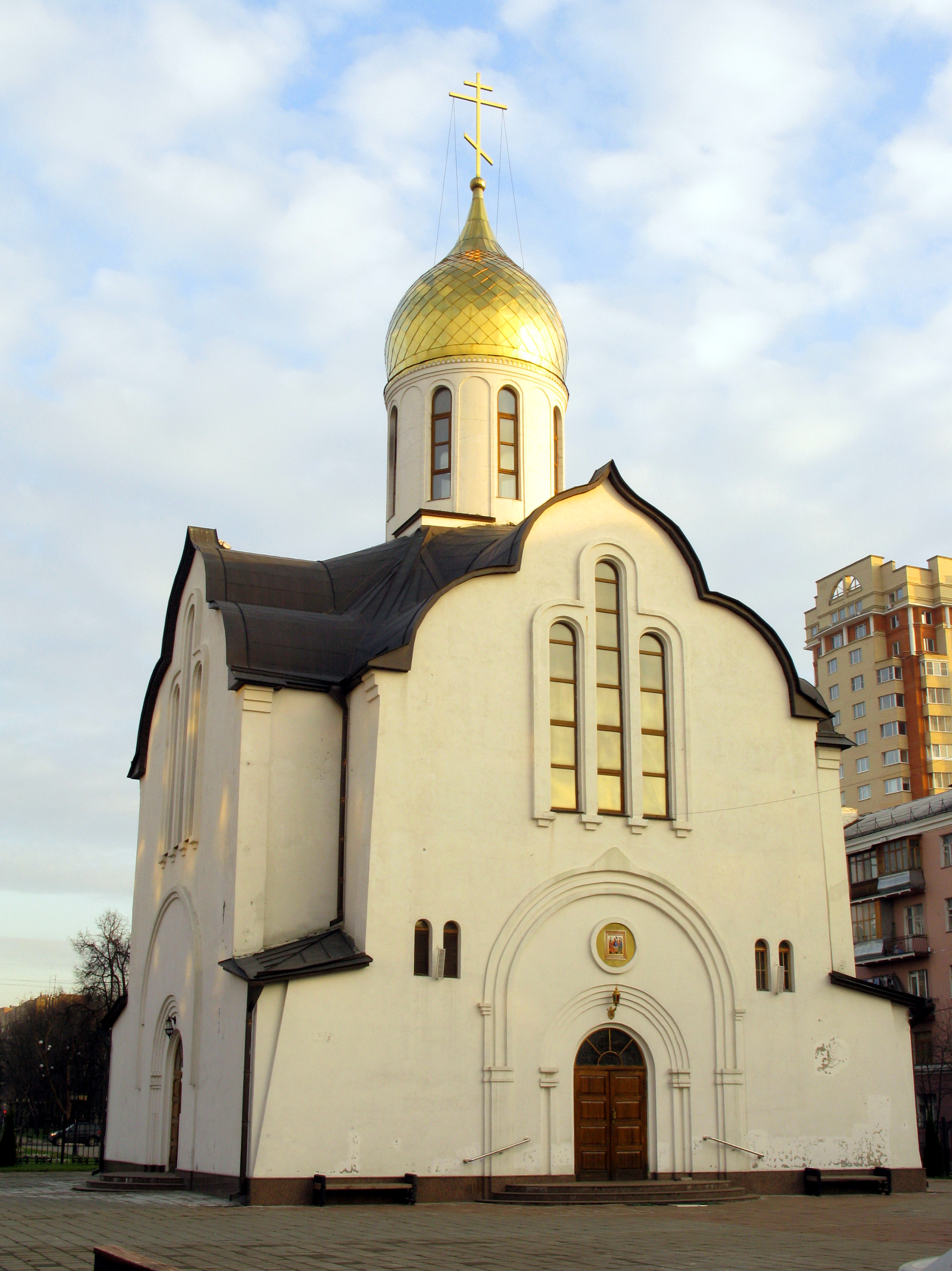 Храм Святого благоверного князя Александра Невского (Балашиха)